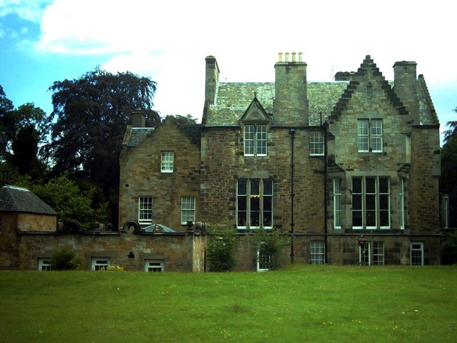 Pittendreich House, Lasswade